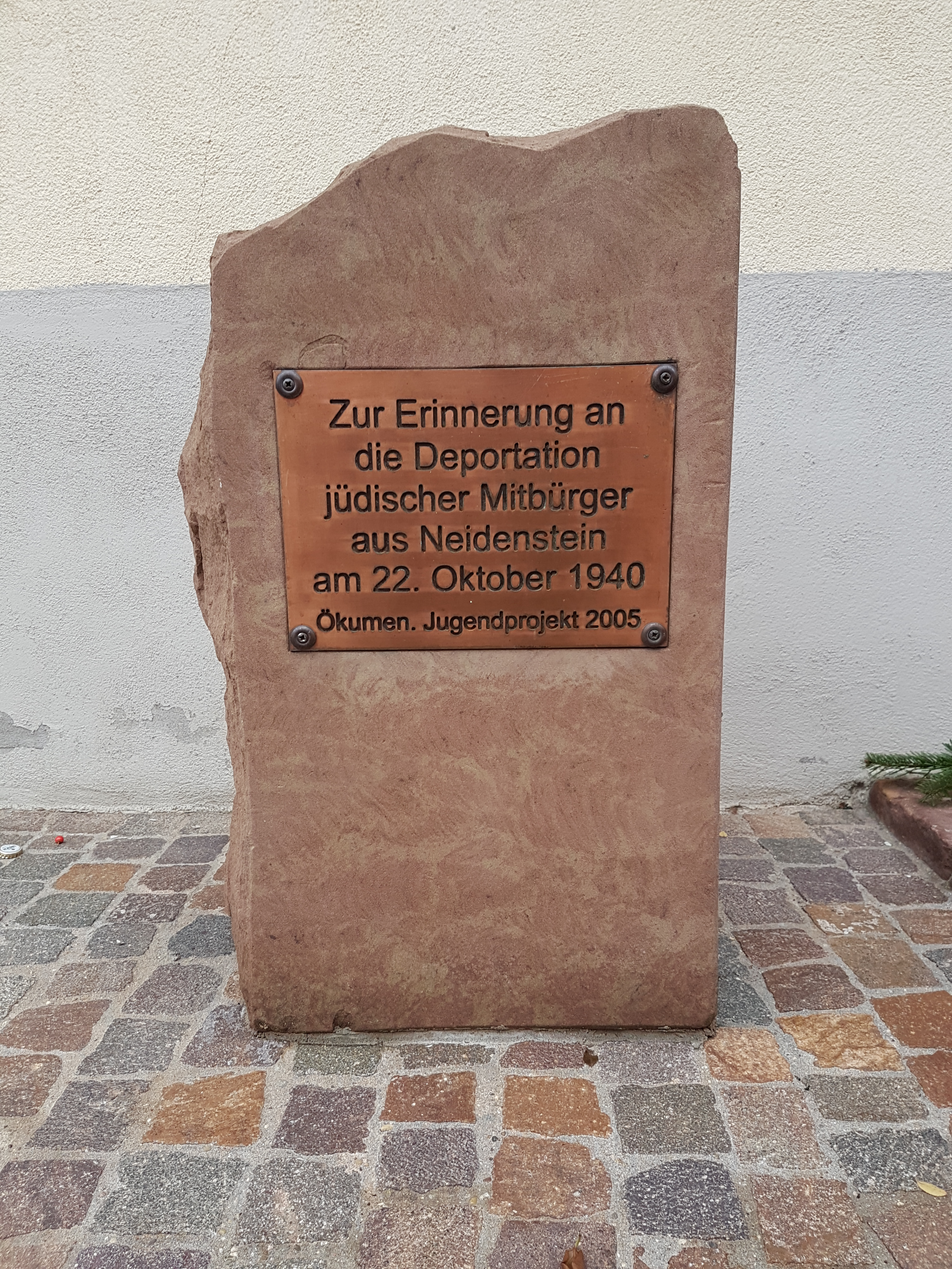 Gurs-Gedenkstein vor dem Rathaus Neidenstein Inschrift: Zur Erinnerung an die Deportation jüdischer Mitbürger aus Neidenstein am 22. Oktober 1940. Ökumen. Jugendprojekt 2005